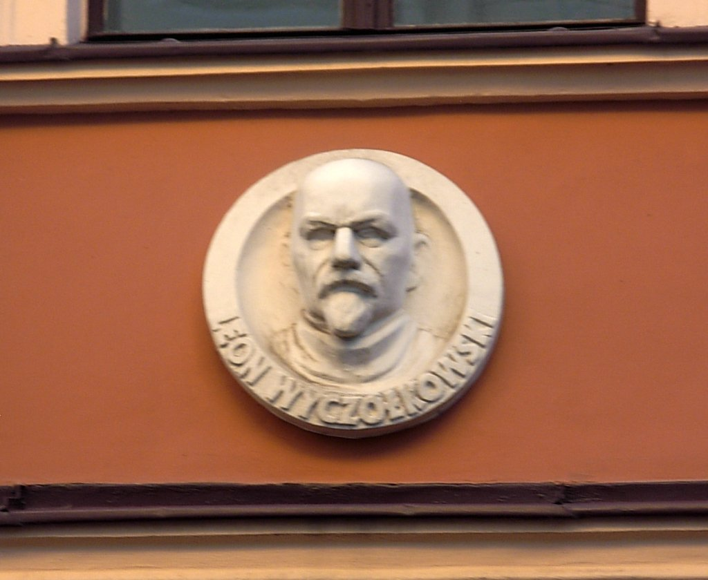 Jezuicka 2 Bydgoszcz - medalion Leon Wyczółkowski